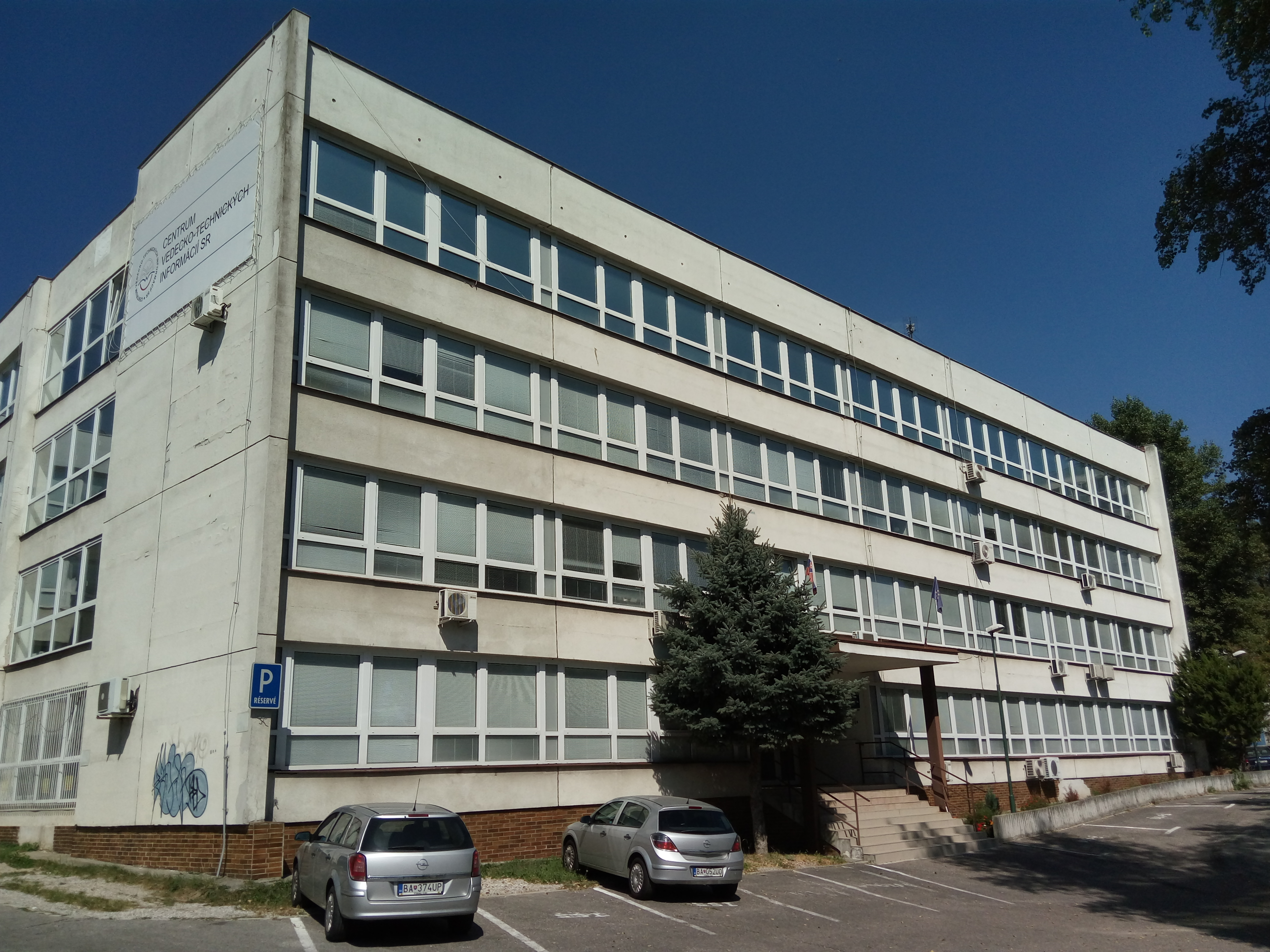 ÚIPŠ, Staré grunty, Karlova Ves, Bratislava